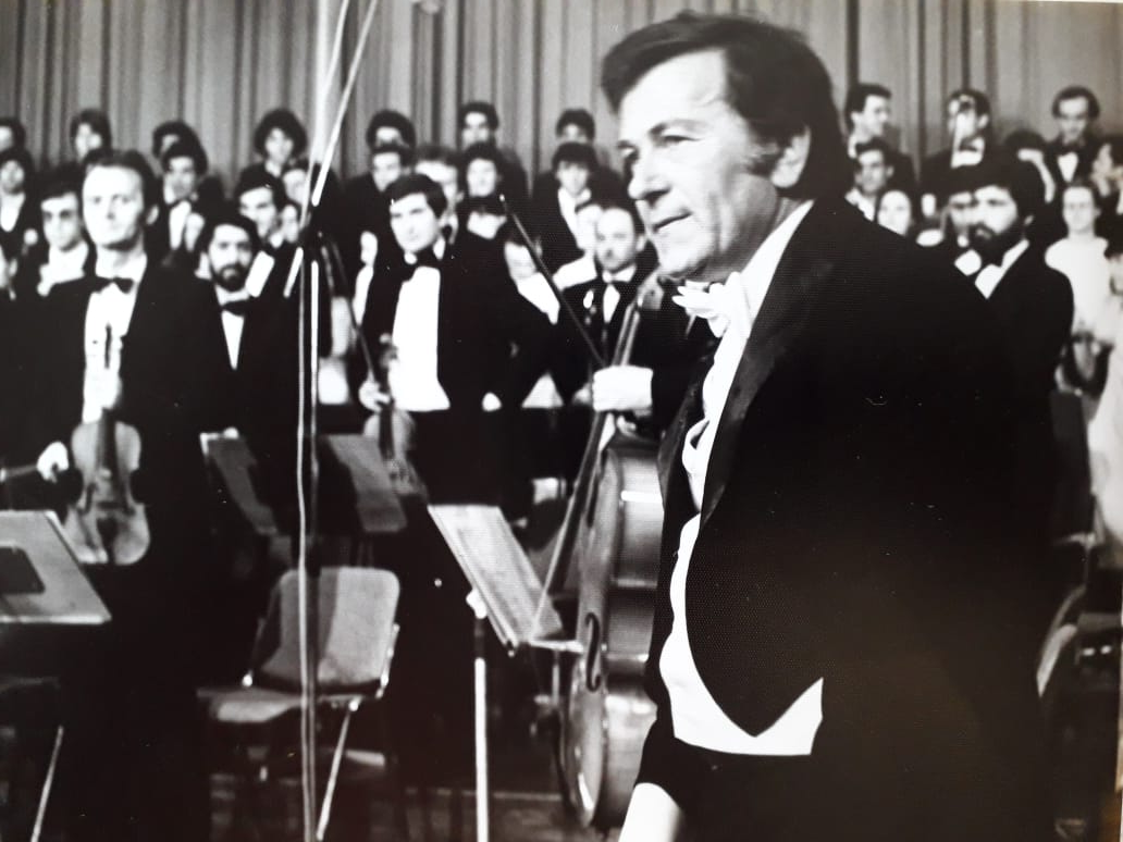 M. Kaçinari duke dirigjuar orkestrën e RTK-së